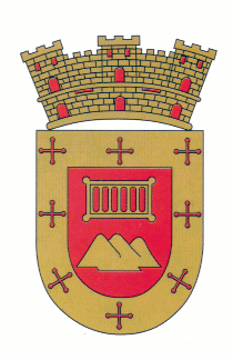 Los esmaltes dorados y gules rojos se escogieron para el escudo de armas de San Lorenzo porque son las que llevan el blasón del linaje Muñoz, al que pertenecía don Valeriano Muñoz de Oneca. La parrilla es el símbolo tradicional de San Lorenzo, diácono mártir y patrón del pueblo, porque en una parrilla sufrió martirio, asado a fuego lento. El cerro o monte representa el cerro Gregorio, que domina el panorama de San Lorenzo.La cruz pomellada es uno de los atributos heráldicos de san Miguel Arcangel, cuyo nombre llevó primitivamente el pueblo.